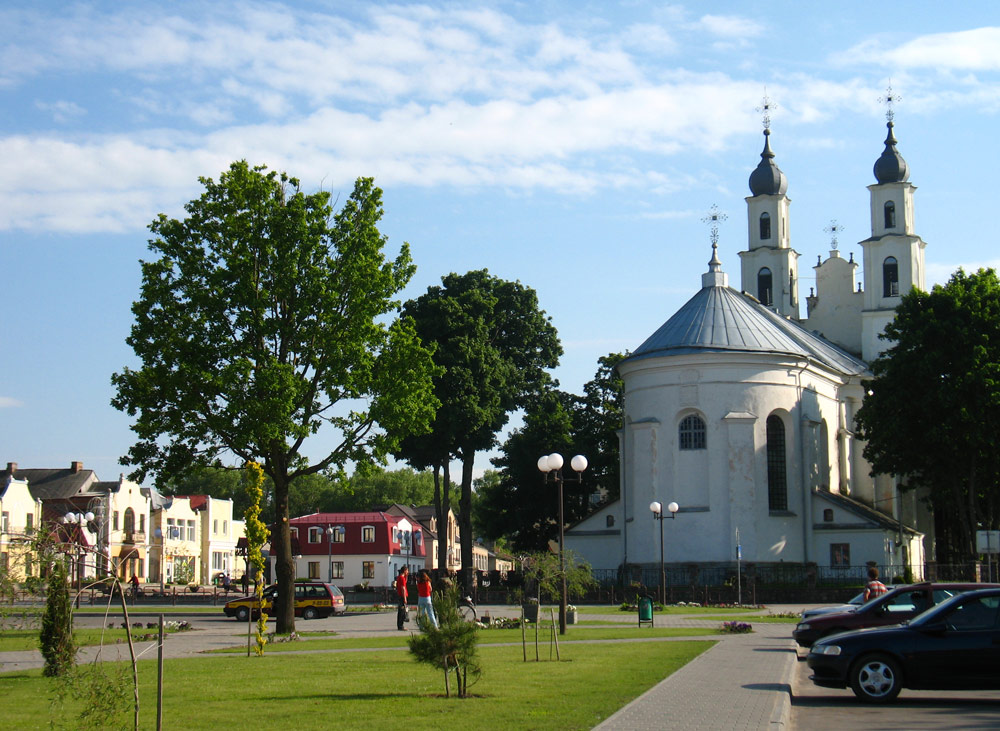 Беларуская (тарашкевіца): Зьдзецел (Дзятлава)